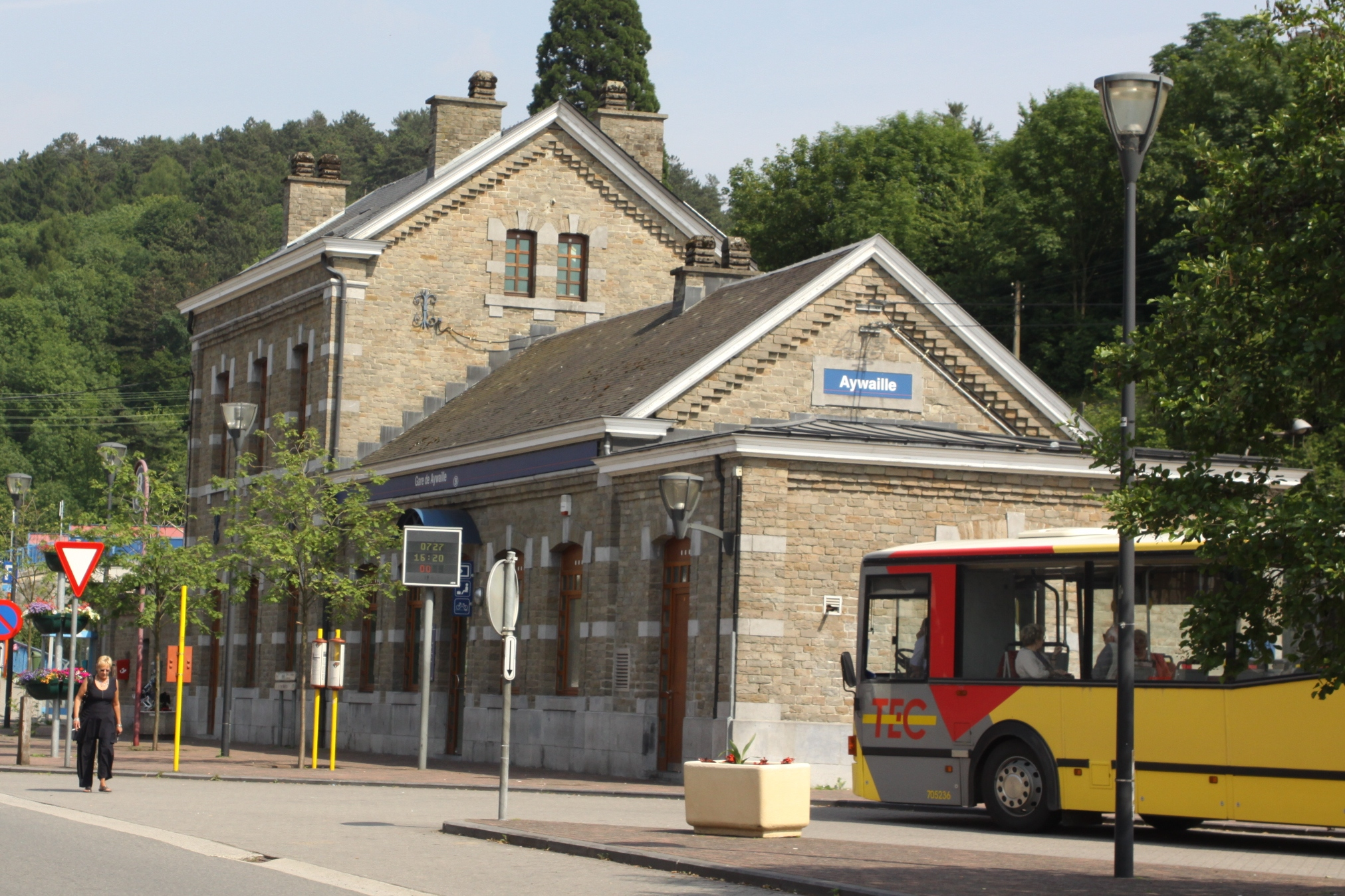 D'Gare vun Aywaille viischt Face.